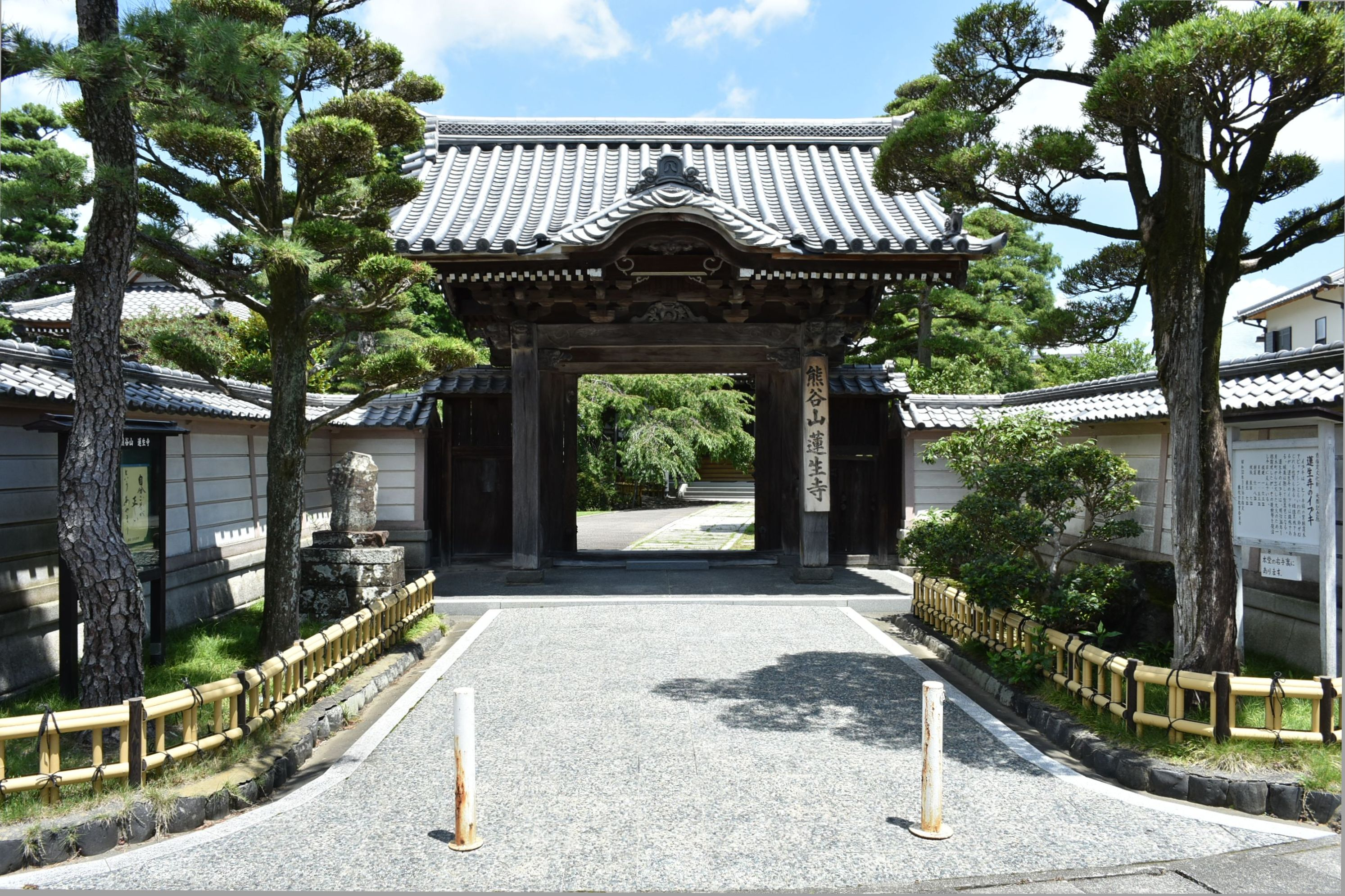 藤枝市 蓮生寺